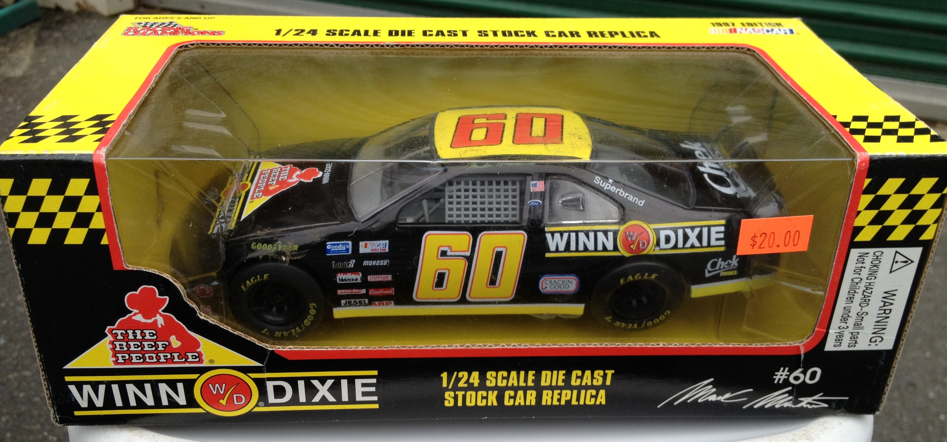 Mark Martin Winn Dixie Car